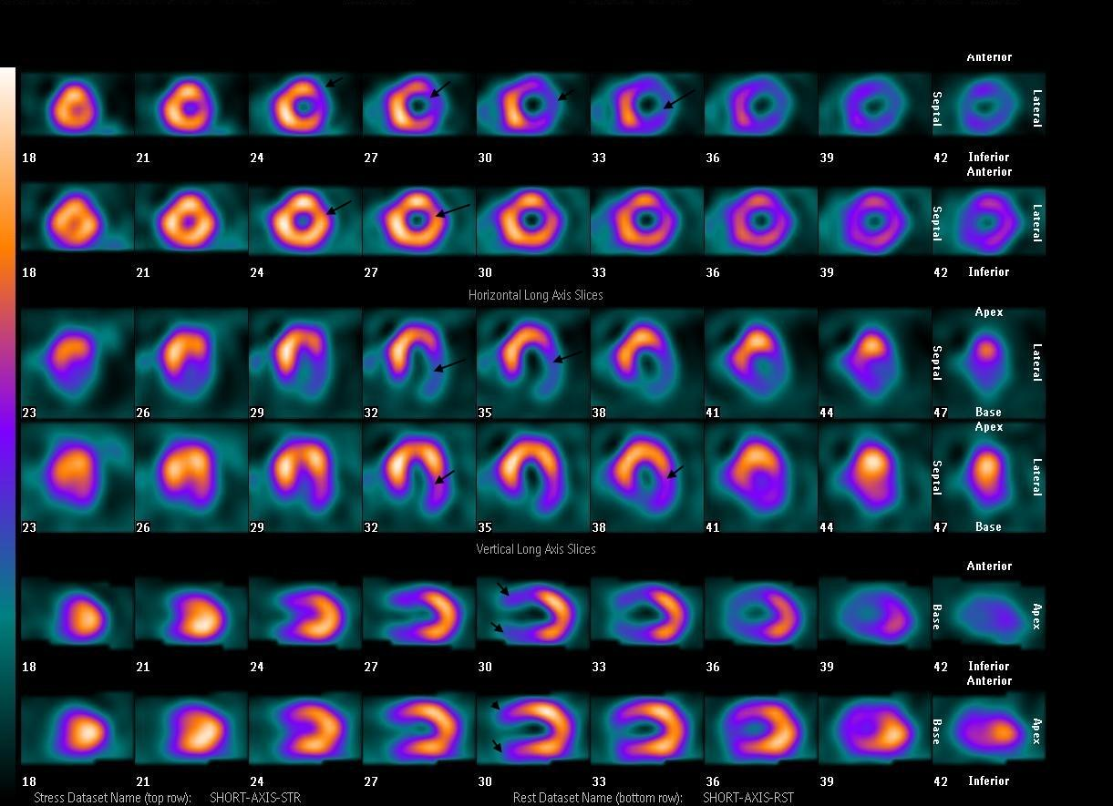 Disminucion de concentracion del trazador radiactivo comprometiendo la pared antero e infero-lateral